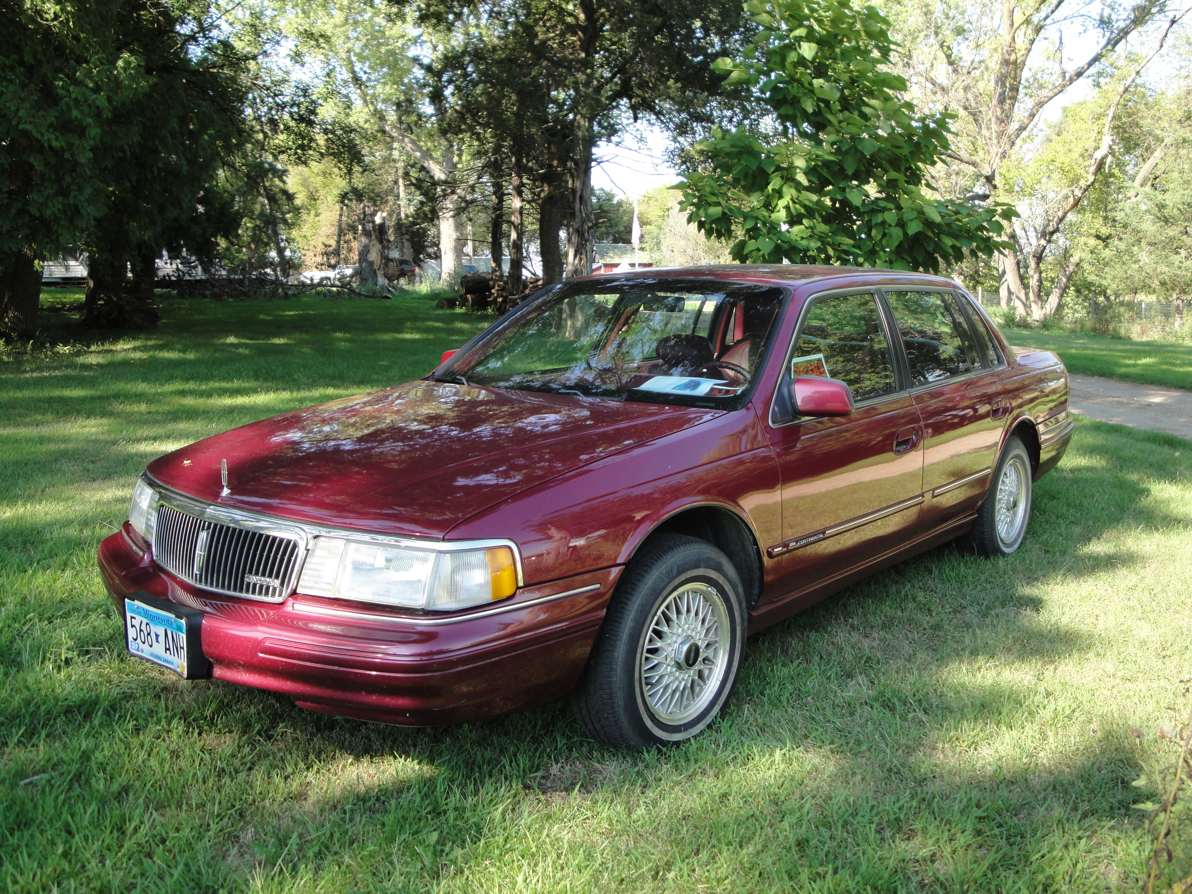 94 Lincoln Continental